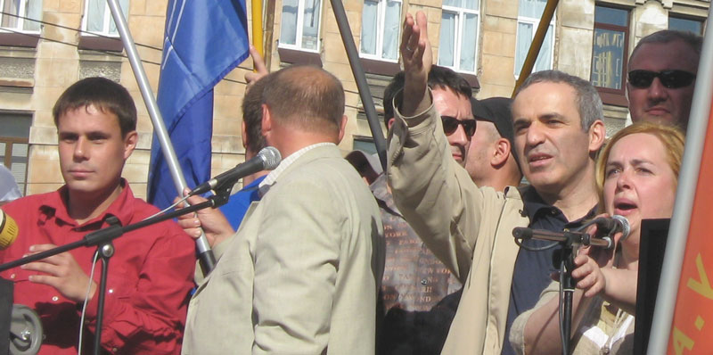 На Марше Несогласных 9 июня (слева направо): Андрей Дмитриев, Сергей Гуляев, Гарри Каспаров, Ольга КурносоваAt the June 9 March of the Discontented (from left to right): Andrei Dmitriyev, Sergei Gulyayev, Garri Kasparov, Olga Kurnosova.